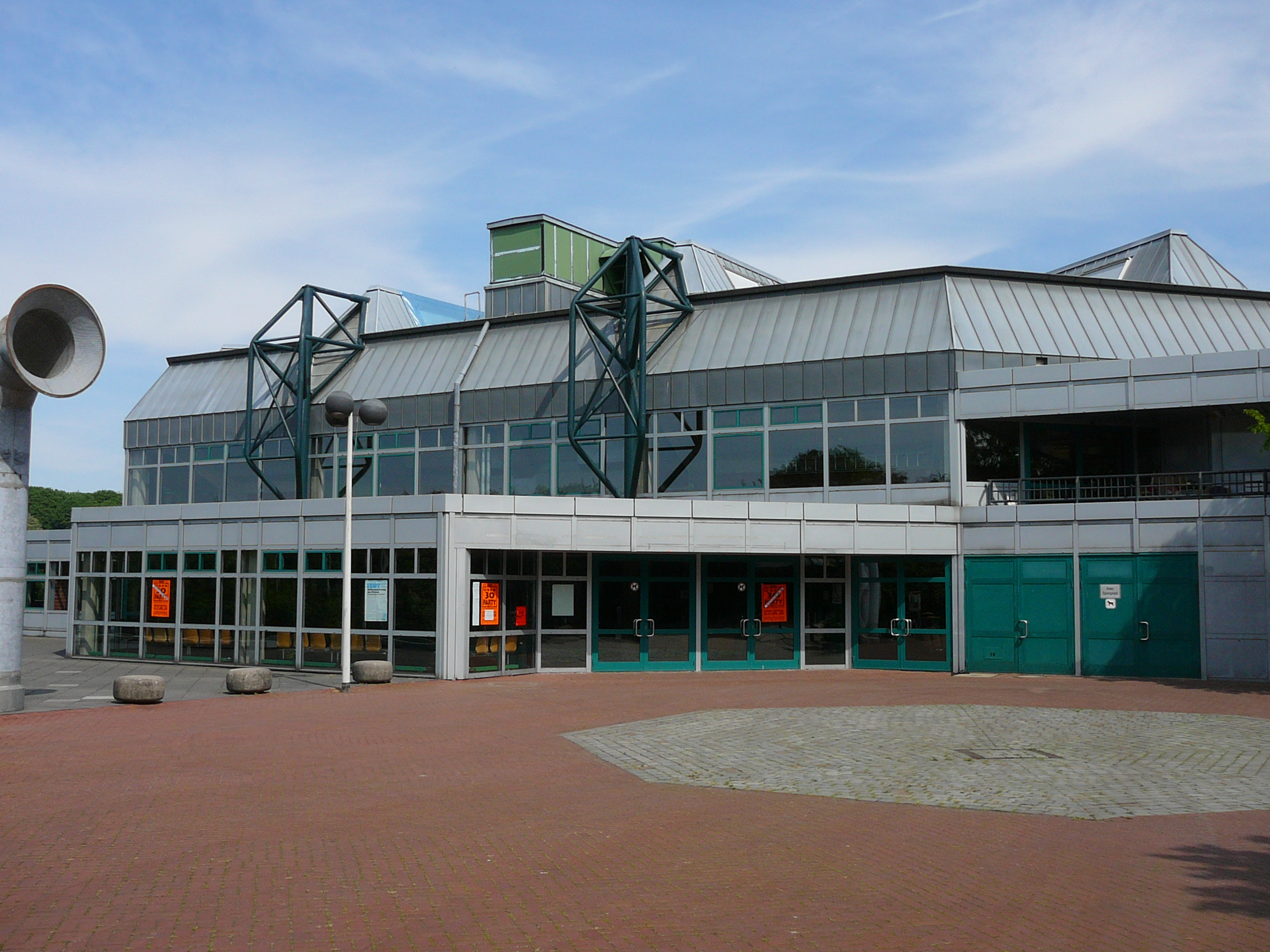 Wuppertaler Unihalle